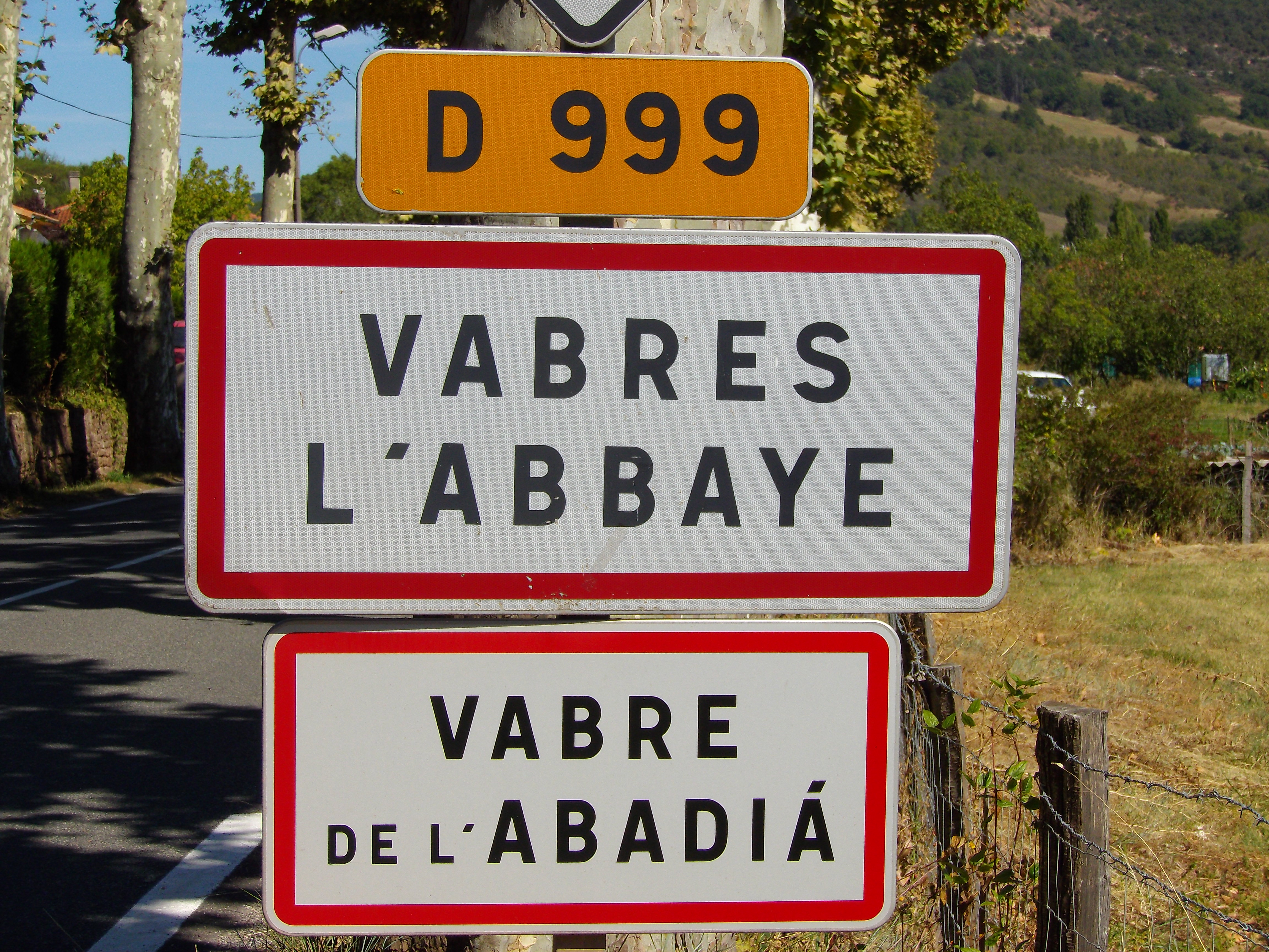 Panneau bilingue français-occitan à l'entrée de Vabres-L'Abbaye (Aveyron, France)